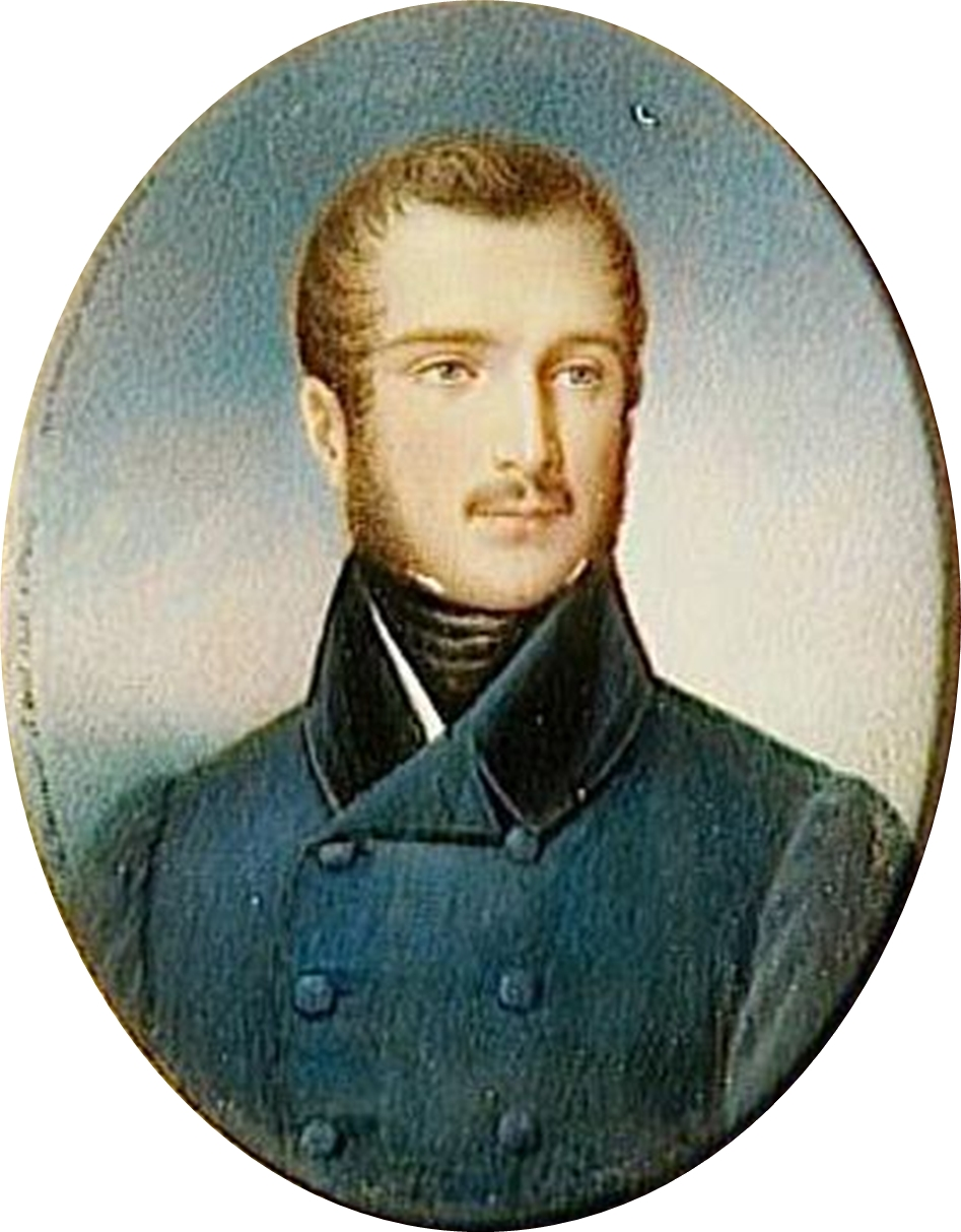 Second fils de Louis et Hortense Bonaparte